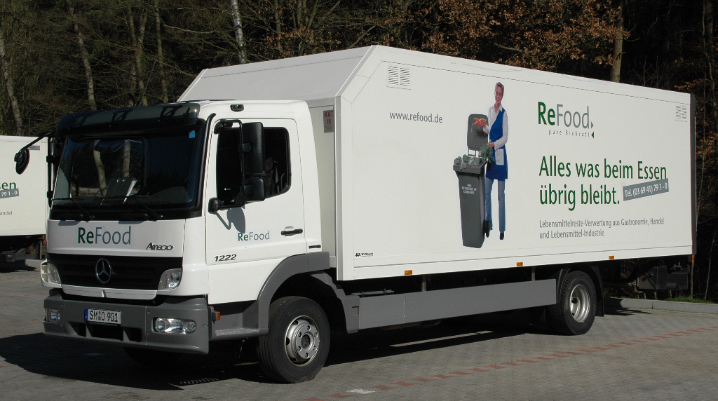 ReFood Spezialfahrzeug